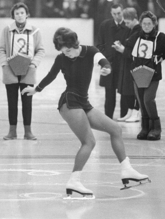 Uschi Kessler Zentralbild Kohls 12.12.1963 Schneider Eiskunstlauf: Ralph Borghardt und Uschi Kessler führen nach der Pflicht Die Qualifikation der Eiskunstläufer aus den beiden deutschen Staaten um die noch vier offenen Plätze in der Gemeinsamen deutschen Olympiamannschaft für Innsbruck begannen am 12.12.1963 in der Berliner Werner-Seelenbinder-Halle mit dem Pflichtlaufen der Männer und Frauen. Nach insgesamt 5 Pflichtfiguren konnte sich der Deutsche Meister Ralph Borghardt mit klarem Vorsprung vor dem Oberstdorfer Sepp Schönmetzler an die Spitze setzen. In der Auseinandersetzung um den noch freien Platz bei den Frauen ist Uschi Kessler (Westdeutschland) nach einer ausgeglichenen Leistung der Pflicht in Führung gegangen. UBz: Uschi Kessler (Westdeutschland) während des Pflichtlaufens.